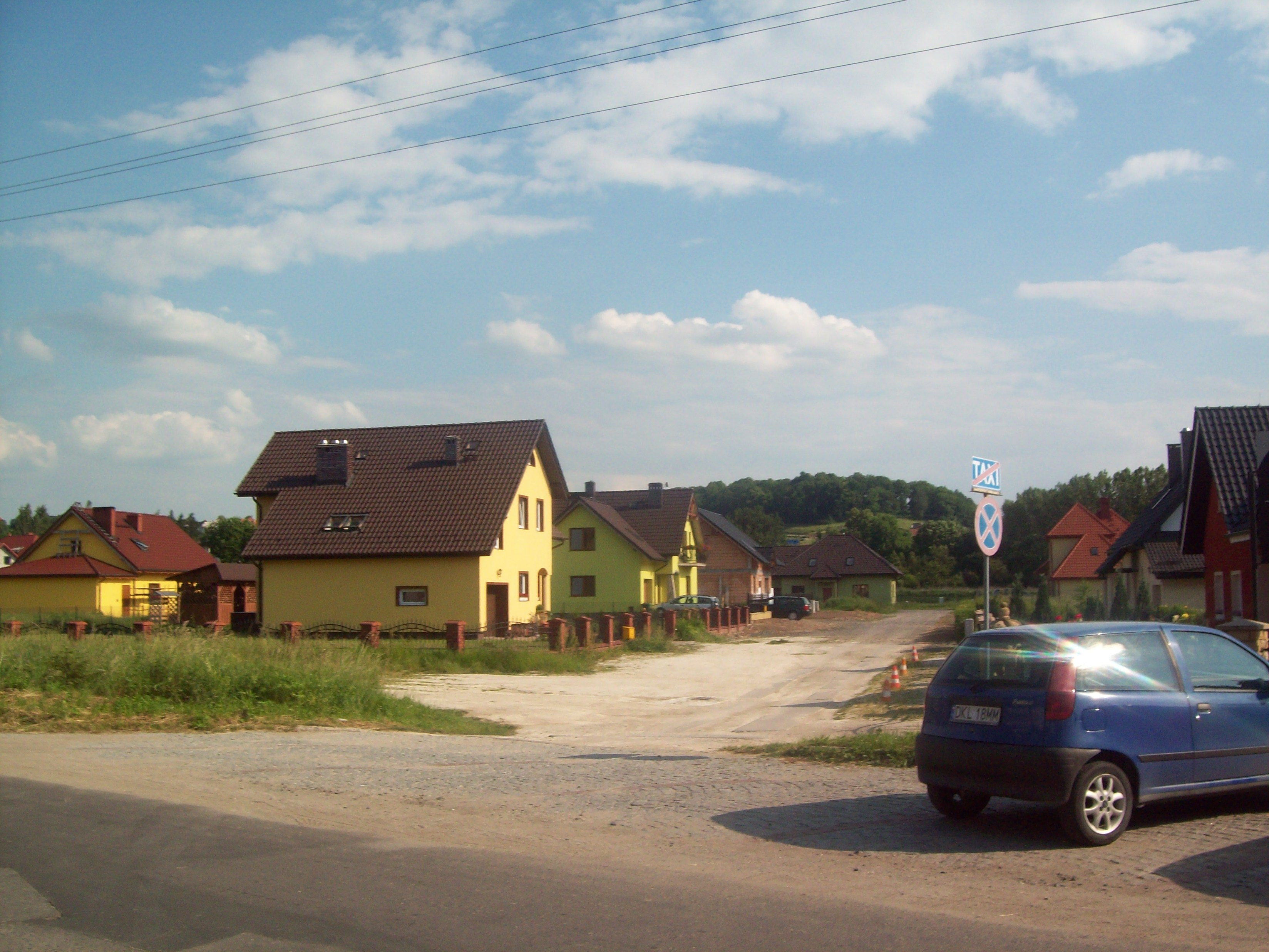 ulica Szpitalna w Kłodzku